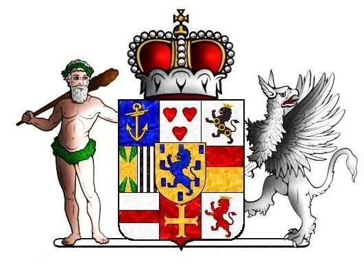 Wappen der Fürsten und Prinzen zu Solms-Braunfels, Herzschild: Stammwappen der Grafen von Solms zu Braunfels; Fürstenhut; Schildhalter: rechts naturfarbener wilder Mann mit geschulterter Holzkeule, links silberner Greif